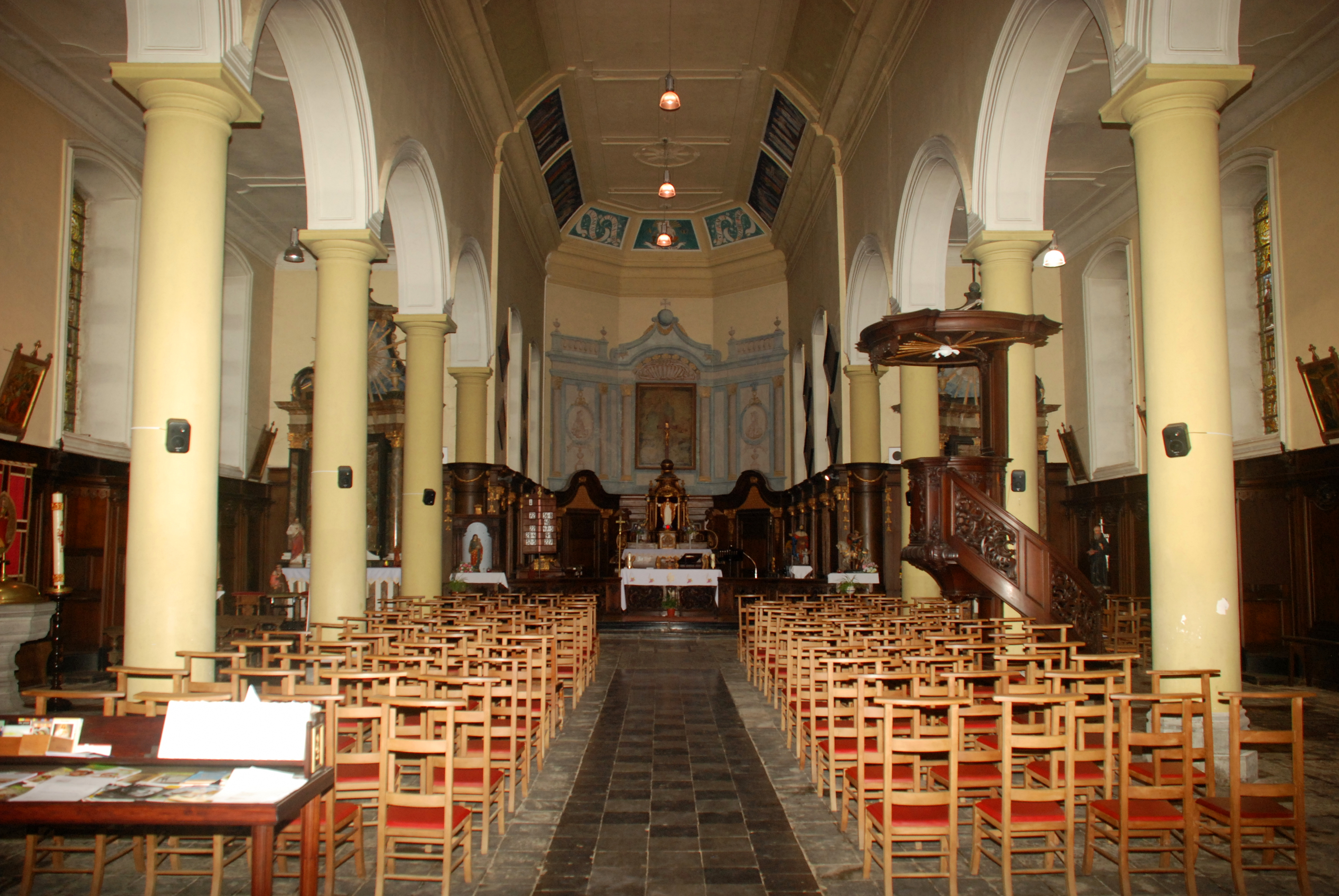 Belgique - Brabant wallon - Église Saint-Martin de Ways